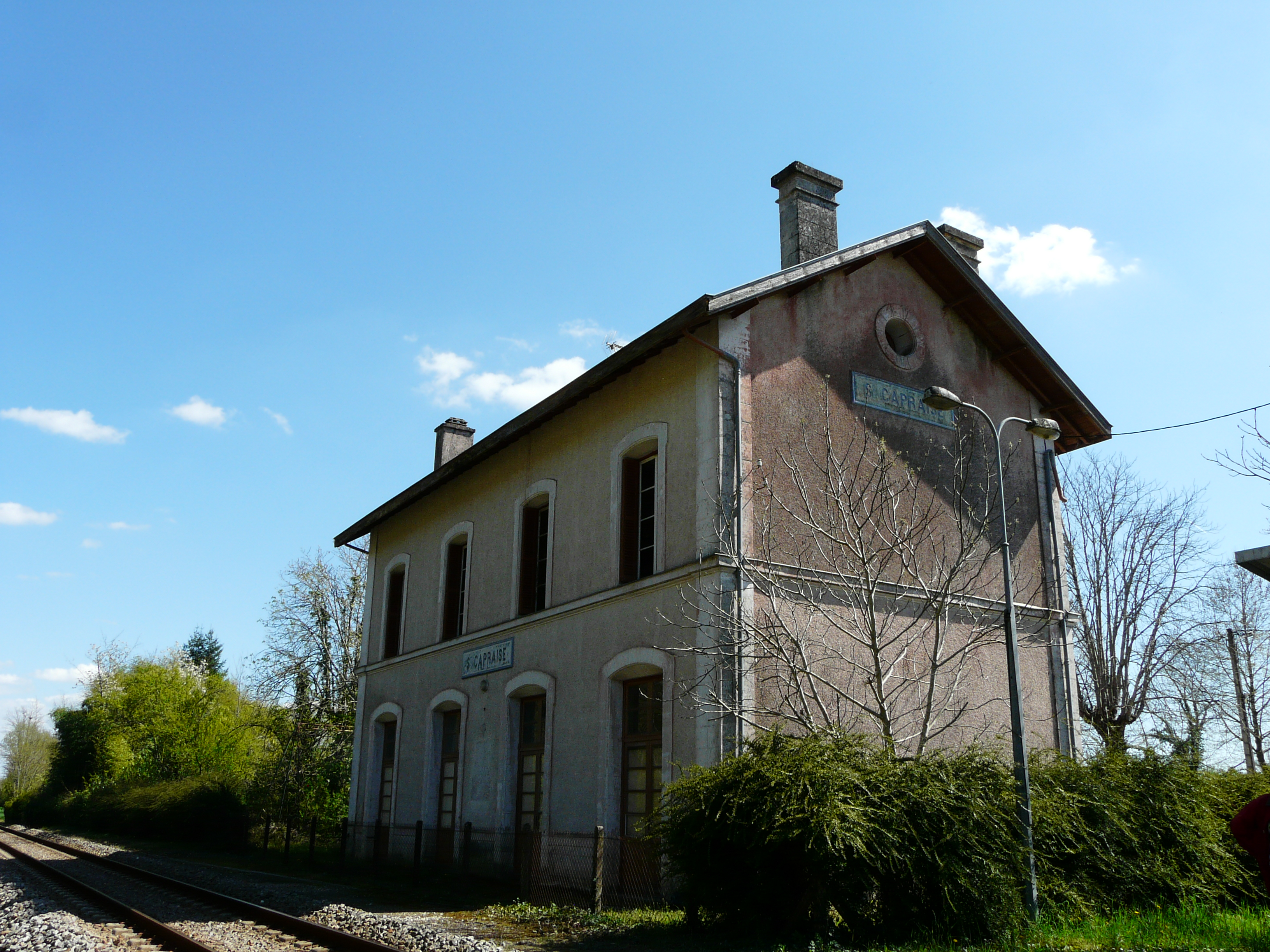 L'ancienne gare de Saint-Capraise-de-Lalinde, Dordogne, France.